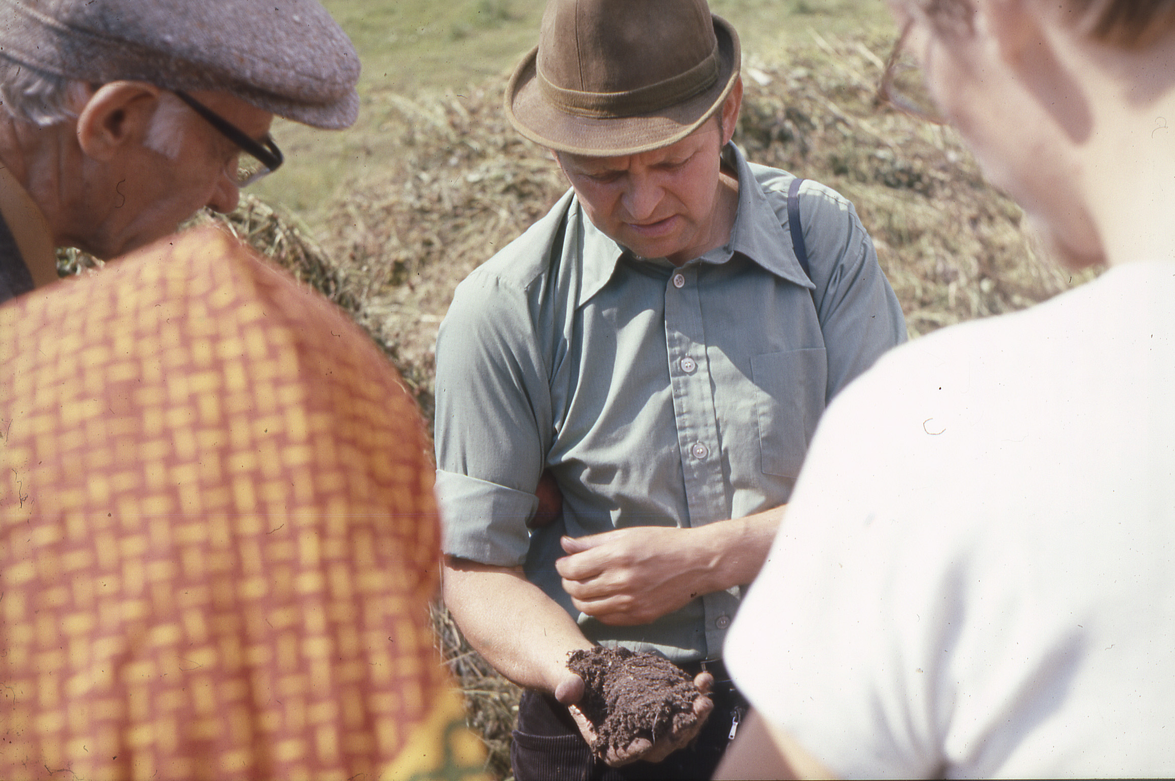 Michael Pax Kirkkonummella 14.8.1977